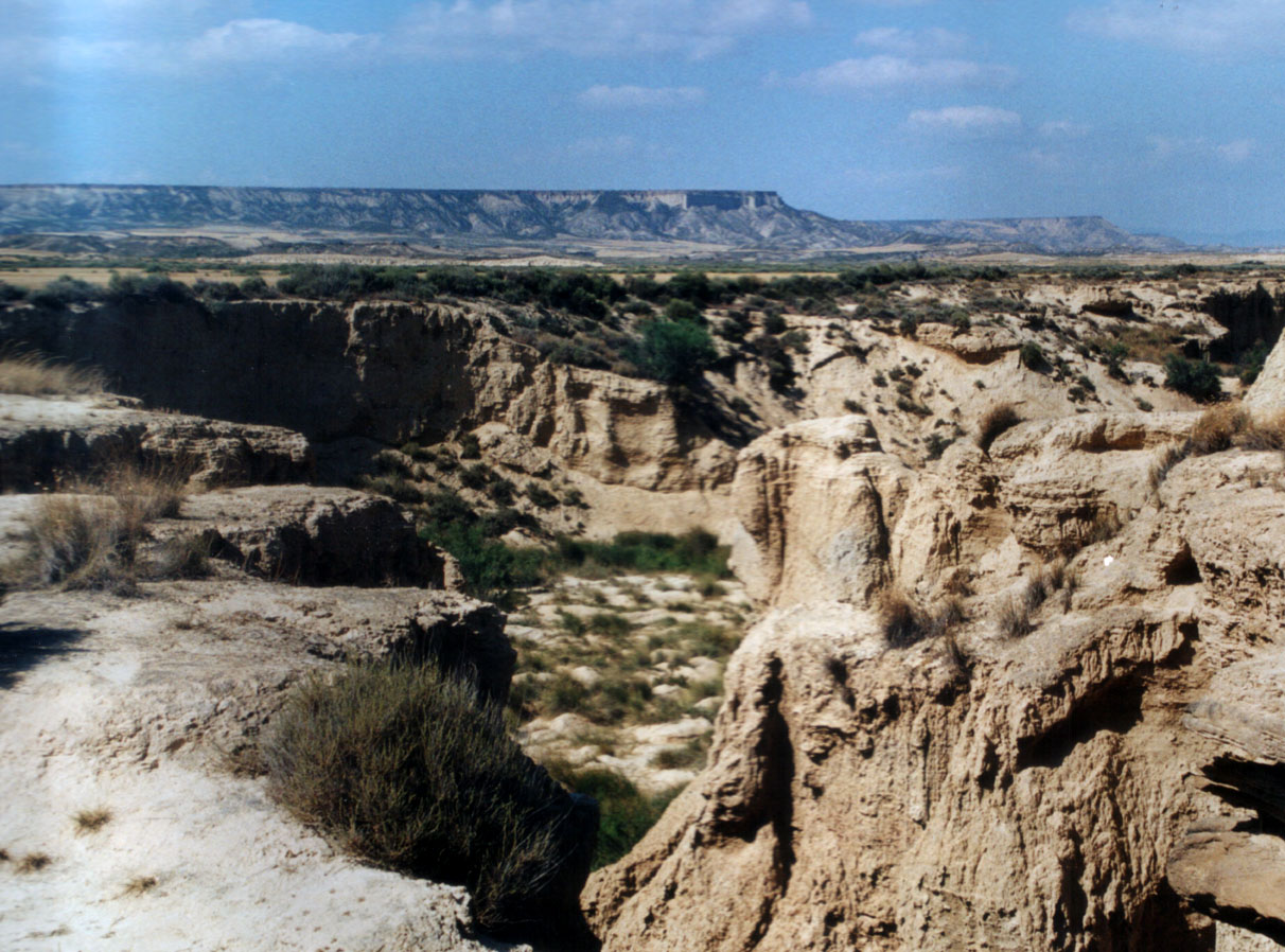 Bardenas Reales, Navarra, Spain